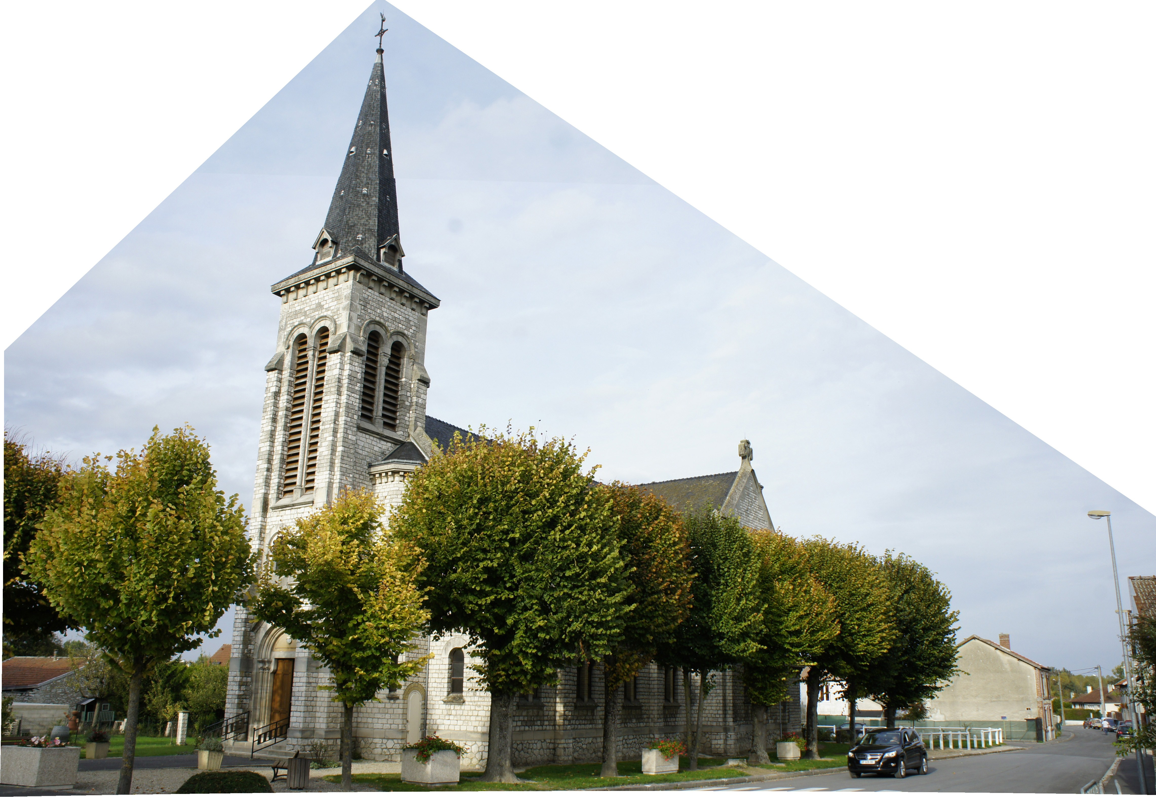 Une vue de l'église de Beaumont.